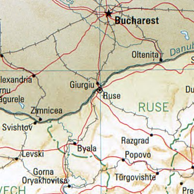 Ruse - Lage des Ortes in Bulgarien